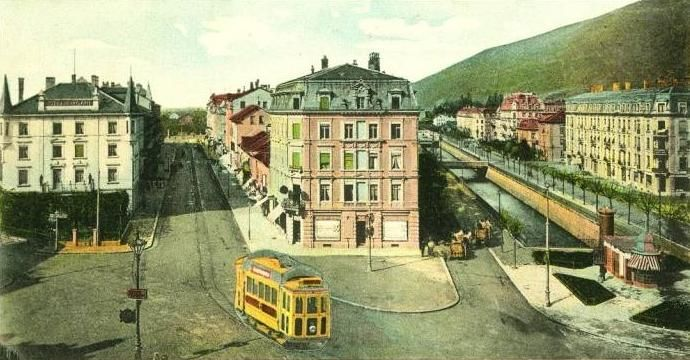 Postkarte der Stadt Biel mit einem Motorwagen der Serie Ce 2/2 1-12 am Zentralplatz. Achtung: Die gelbe Farbe der Motorwagen hat es in dieser From nie gegeben. Korret wäre Weiss.